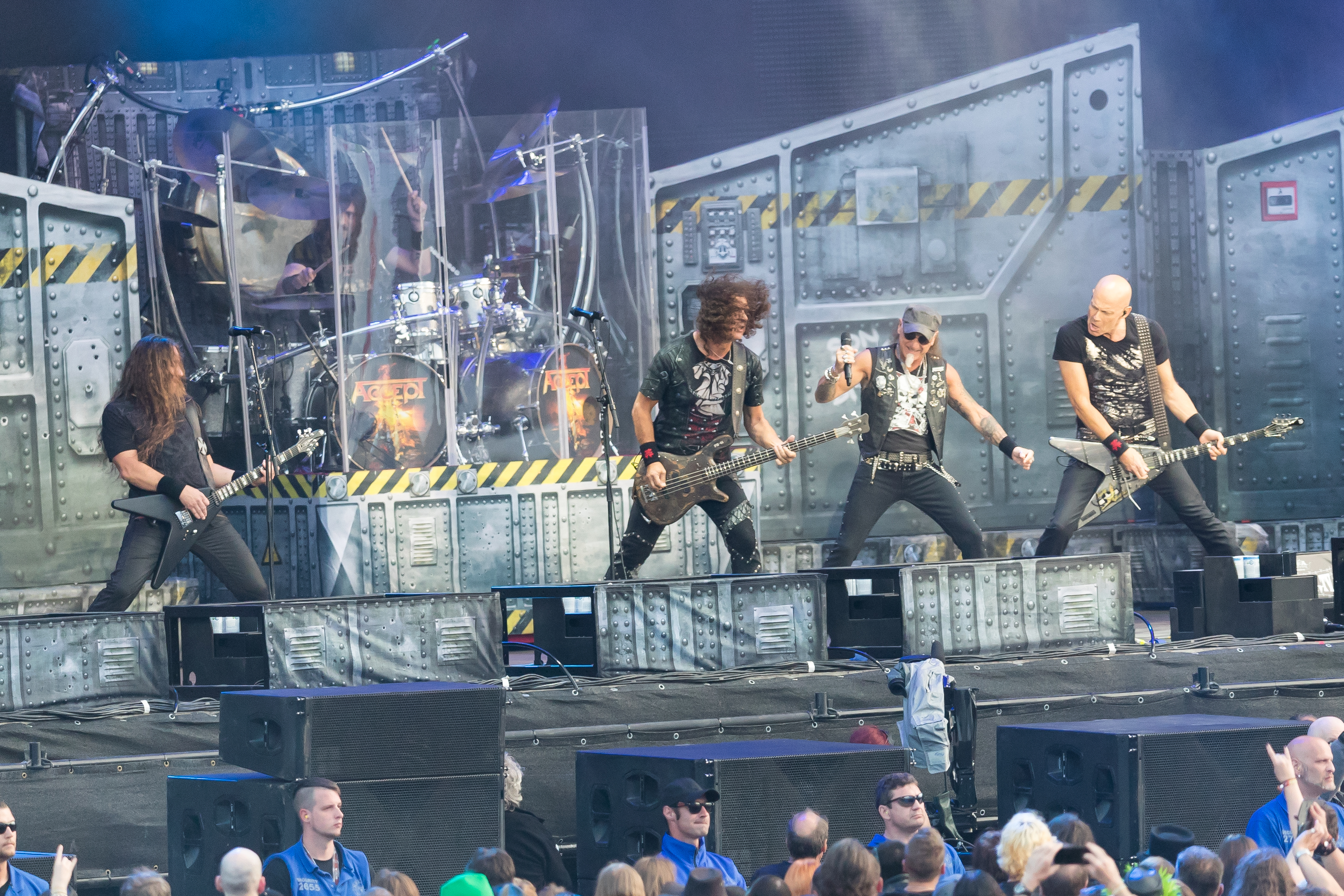 Accept during Wacken Open Air at Schleswig-Holstein, Wacken, , Germany on 2017-08-03, Photo: Sven Mandel